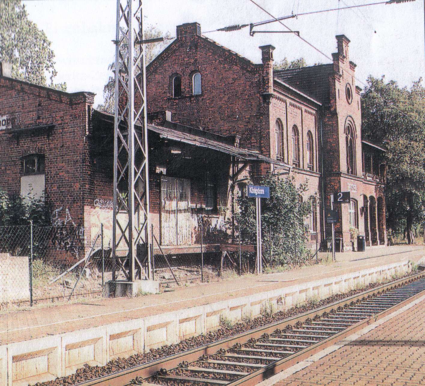 Bahnhof Königsborn (Sachsen-Anhalt)